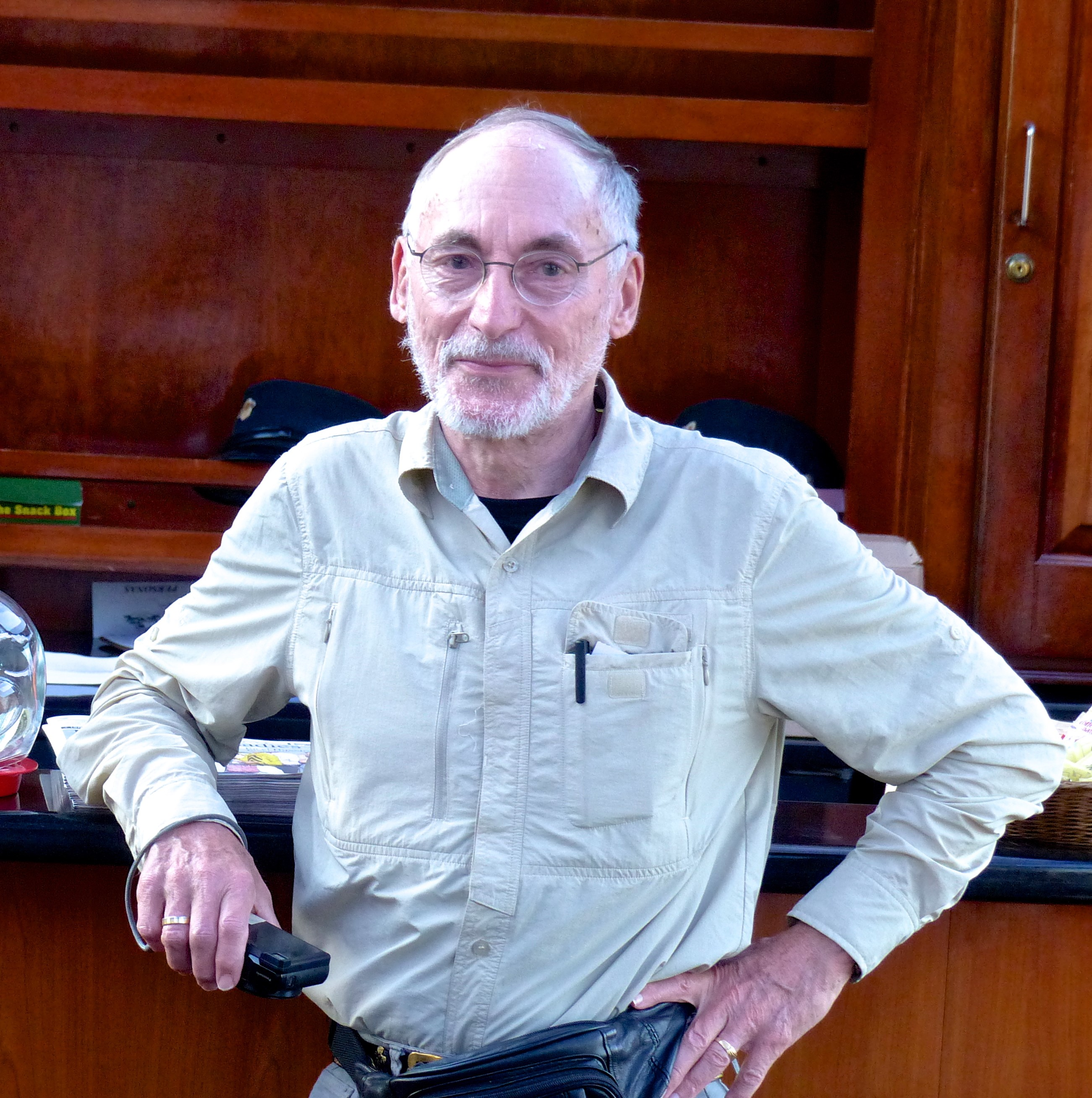 Der Autor am Pult. Aufnahme im Zug in Panama im März 2016